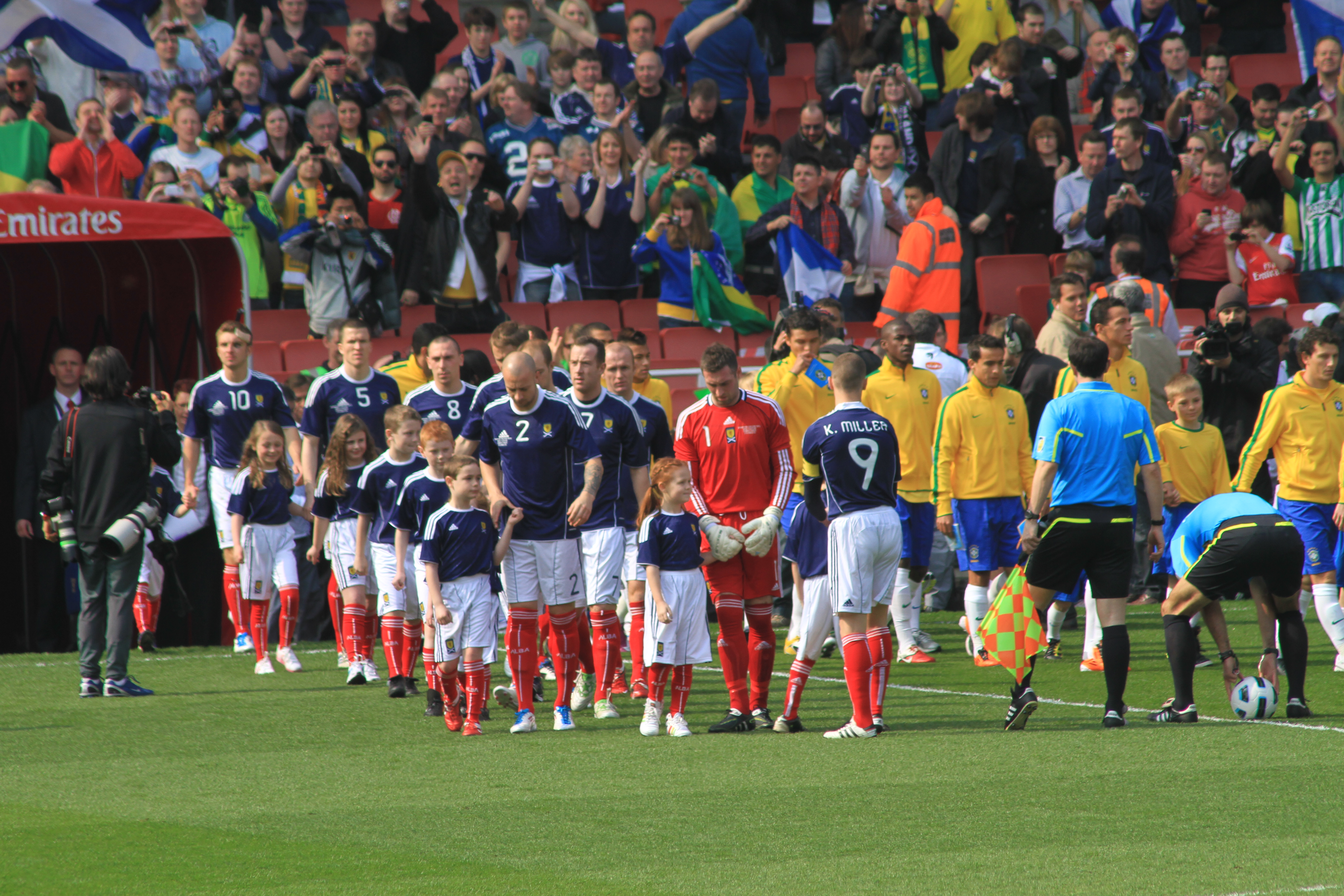 Brazil v Scotland 30